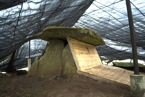 Vista xeral do dolmen de Dombate